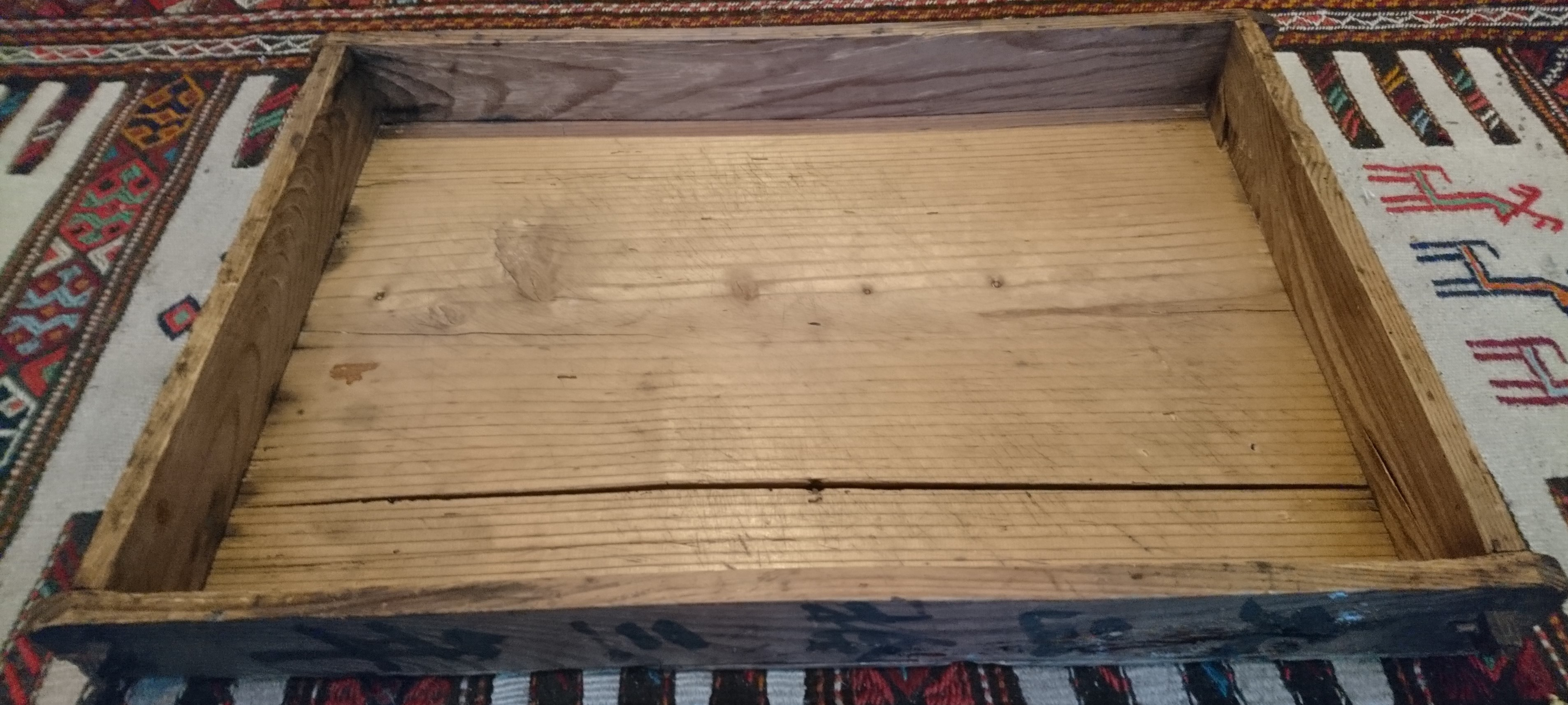 丹後ばらずしに使用される伝統的な道具。餅を並べるのにも使用される。